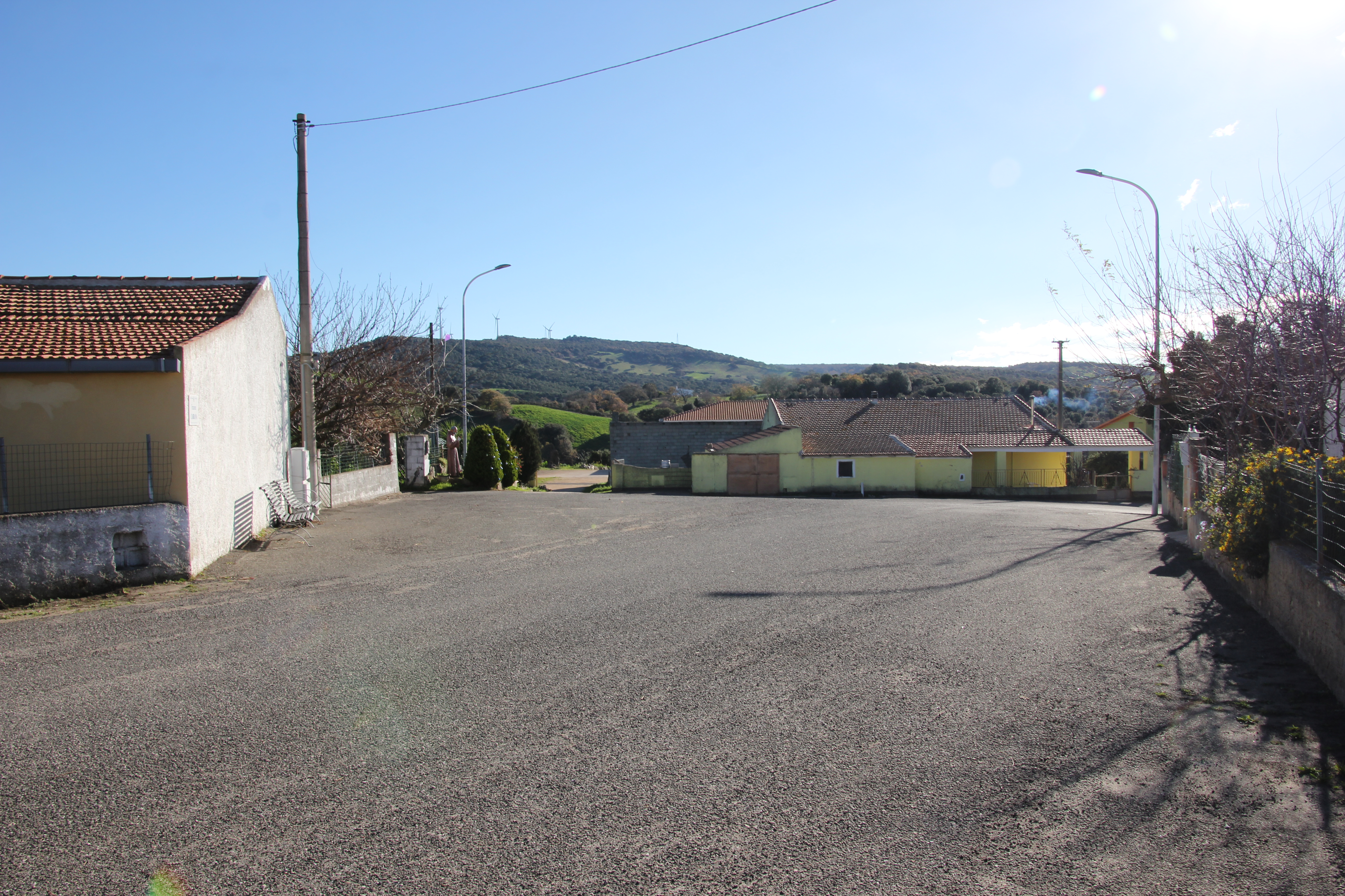 Erula, frazione Cabrana